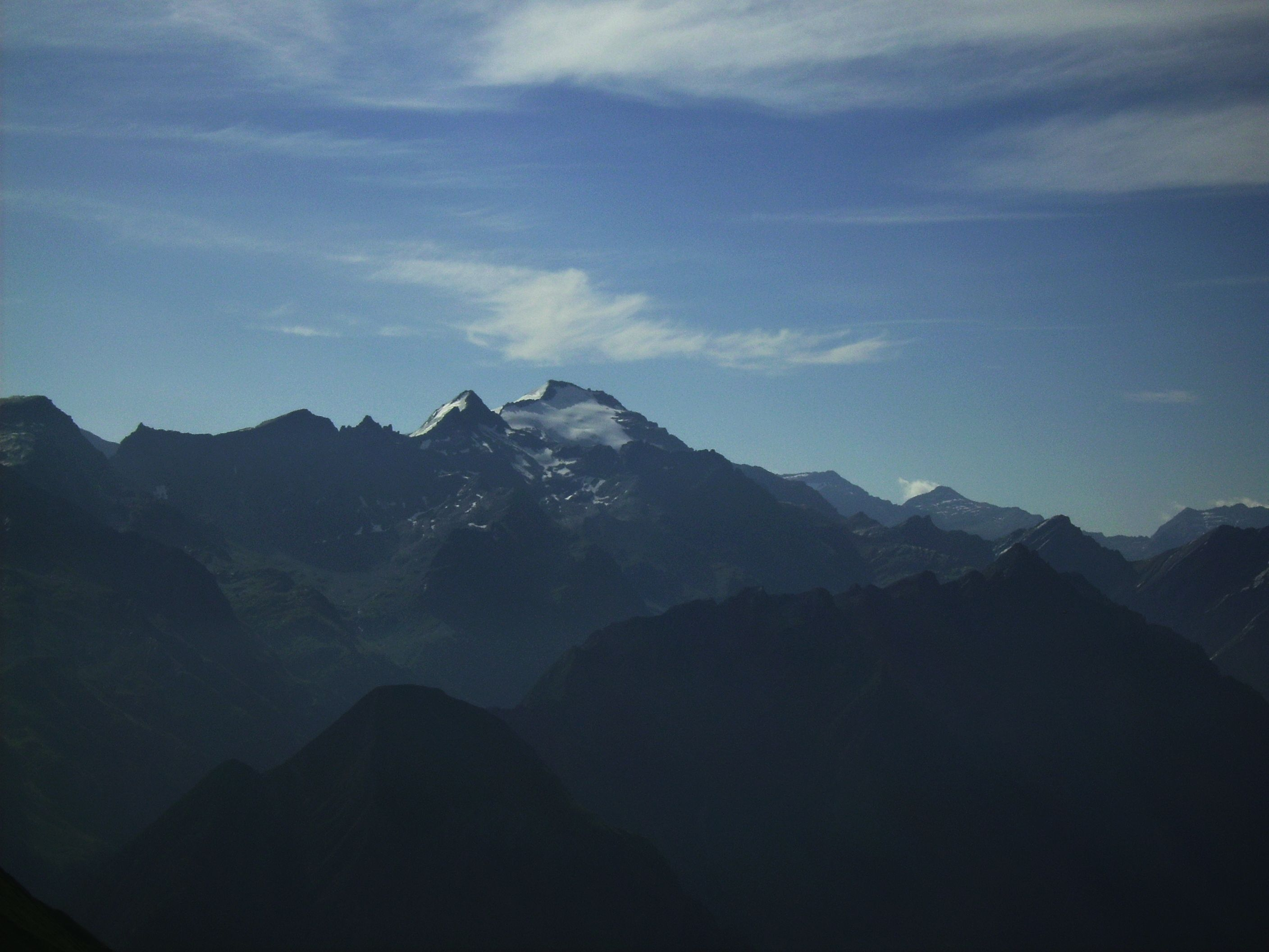 Das Rheinwaldhorn vom Sasso Lanzone (NW) aus gesehen, im Vordergrund die Pinadee-Kette